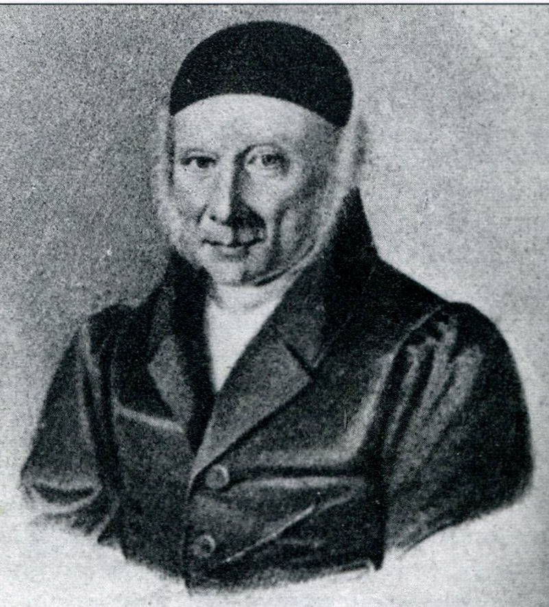 Johann Jakob Christian Engel (1762-1840), ab 1786 Küchenmeister im Kloster Malchow